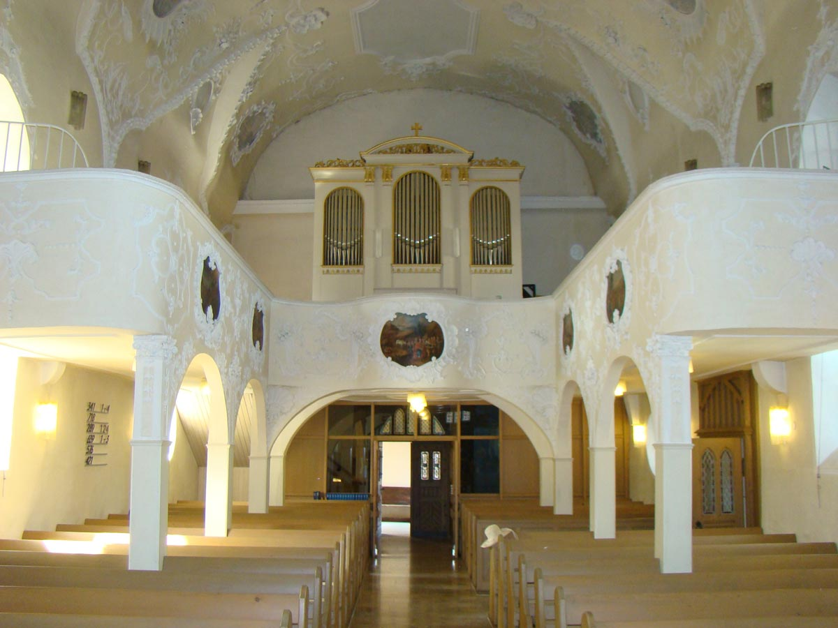 Pfarrkirche St. Hippolyt, Ottmarsheim